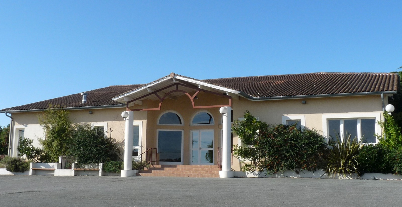 Salle des fêtes, Saint-Ciers-de-Canesse, Gironde, France